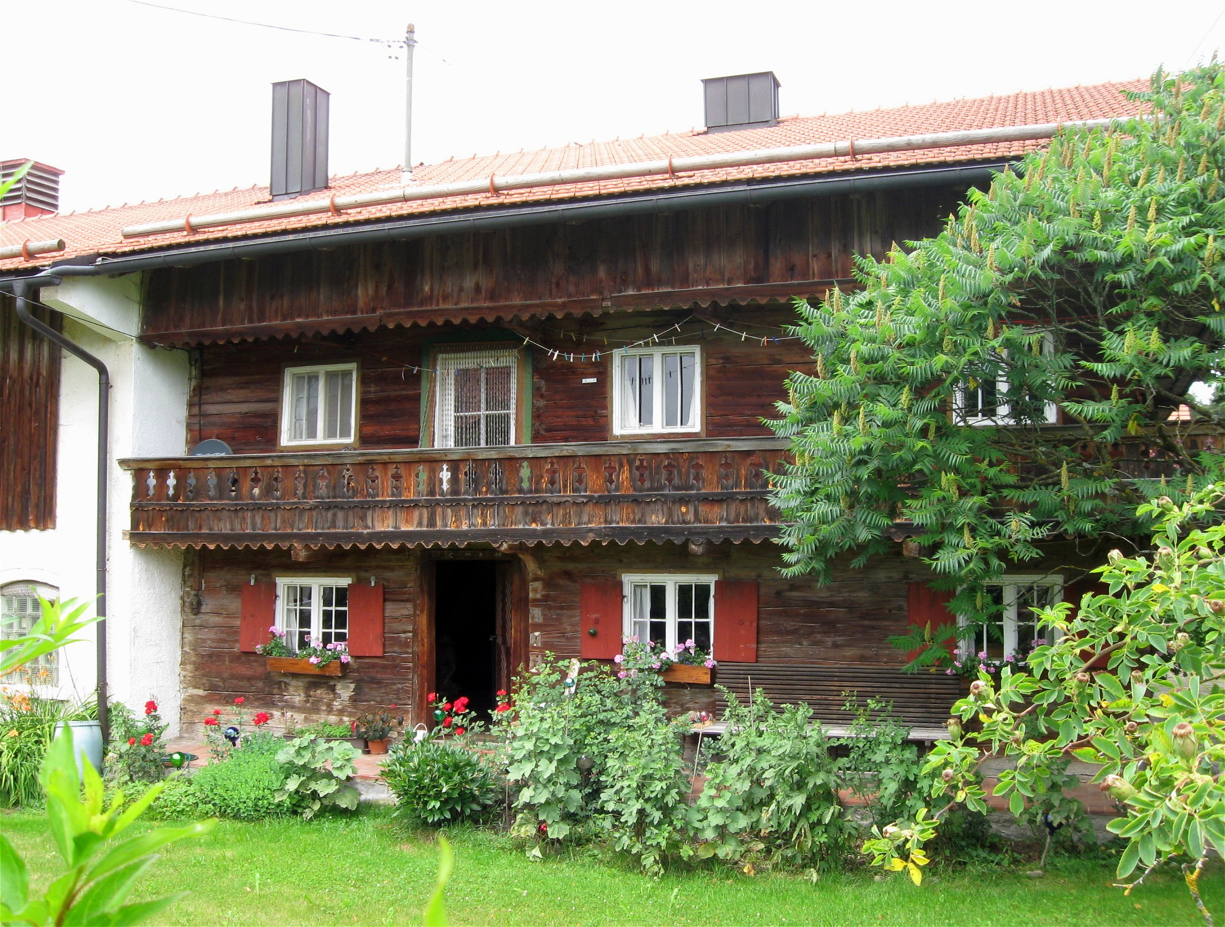 Jettenhausen: Haus Nr. 1; Bauernhaus (beim Bock), zweigeschossiger Blockbau, 1. Hälfte 17. Jh., Dach 18. Jh.; Getreidekasten, Blockbau, wohl 18. Jh., im Garten